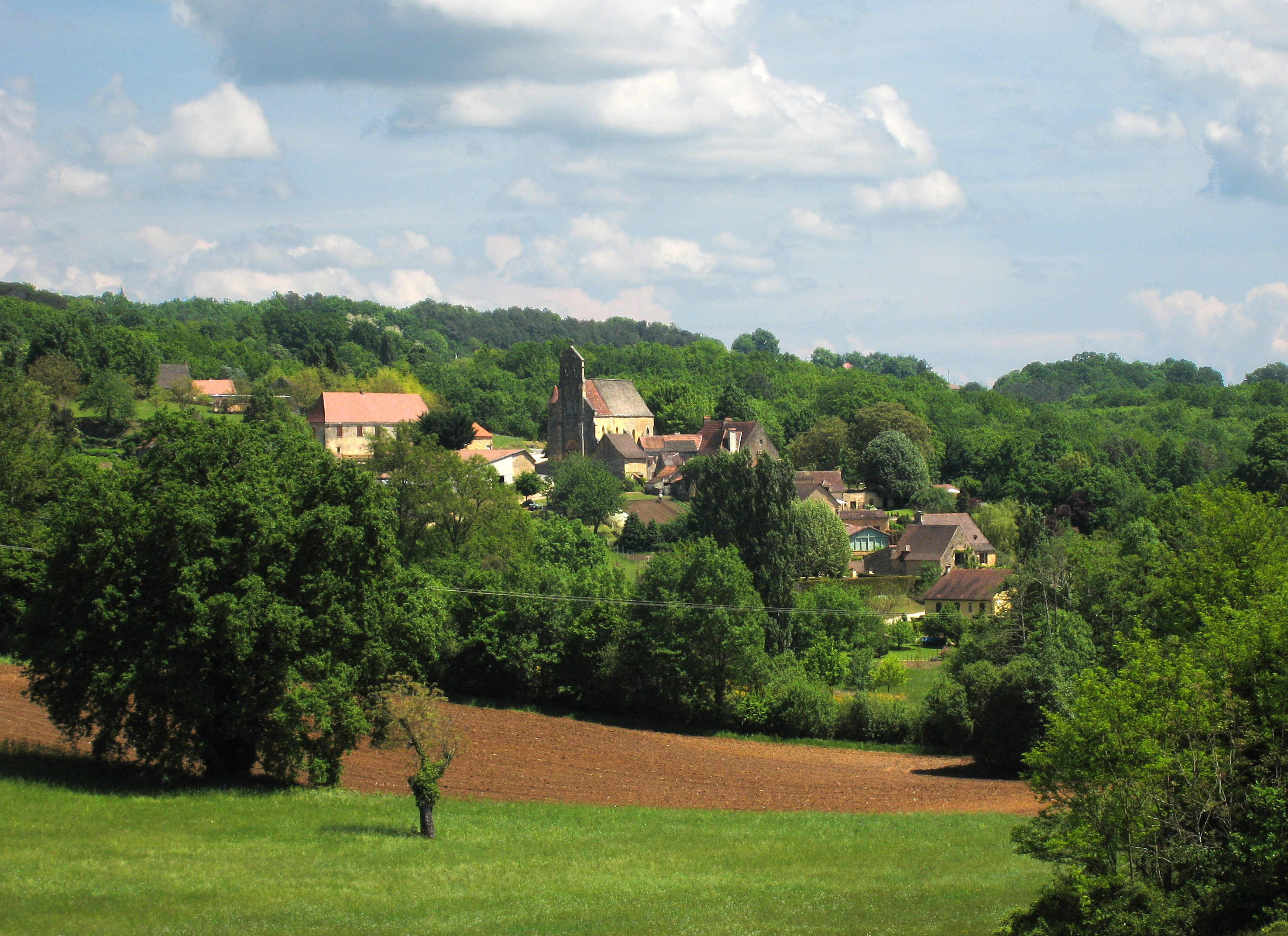 Hamlet of Saint-André-d'Allas in the Périgord-region near the village of Sarlat-la-Canéda, Département Dordogne/France